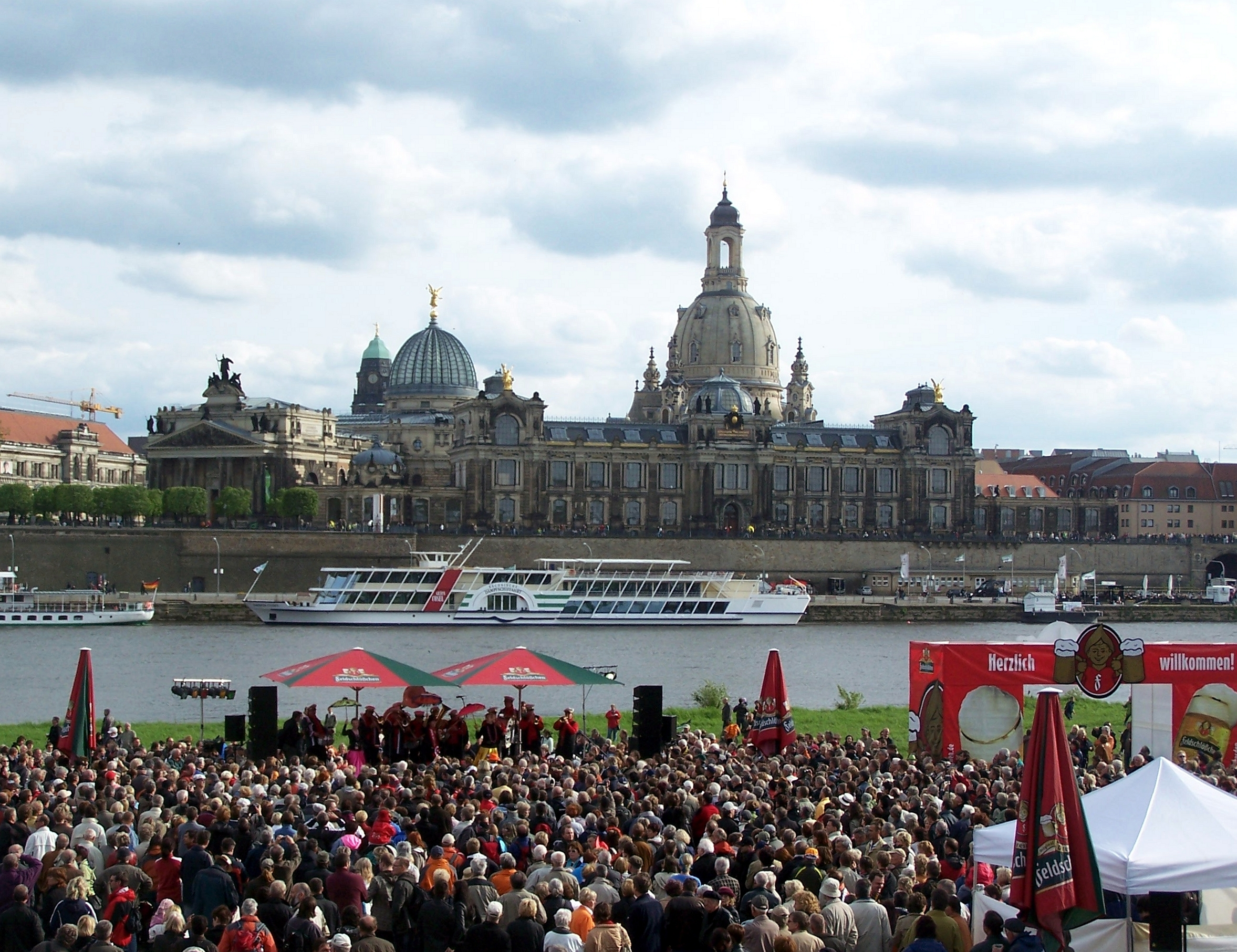 Abschluss-Session des Internationalen Dixielandfestivals Dresden 2010